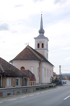 Orth. Kirche in Bodendorf, Siebenbürgen.